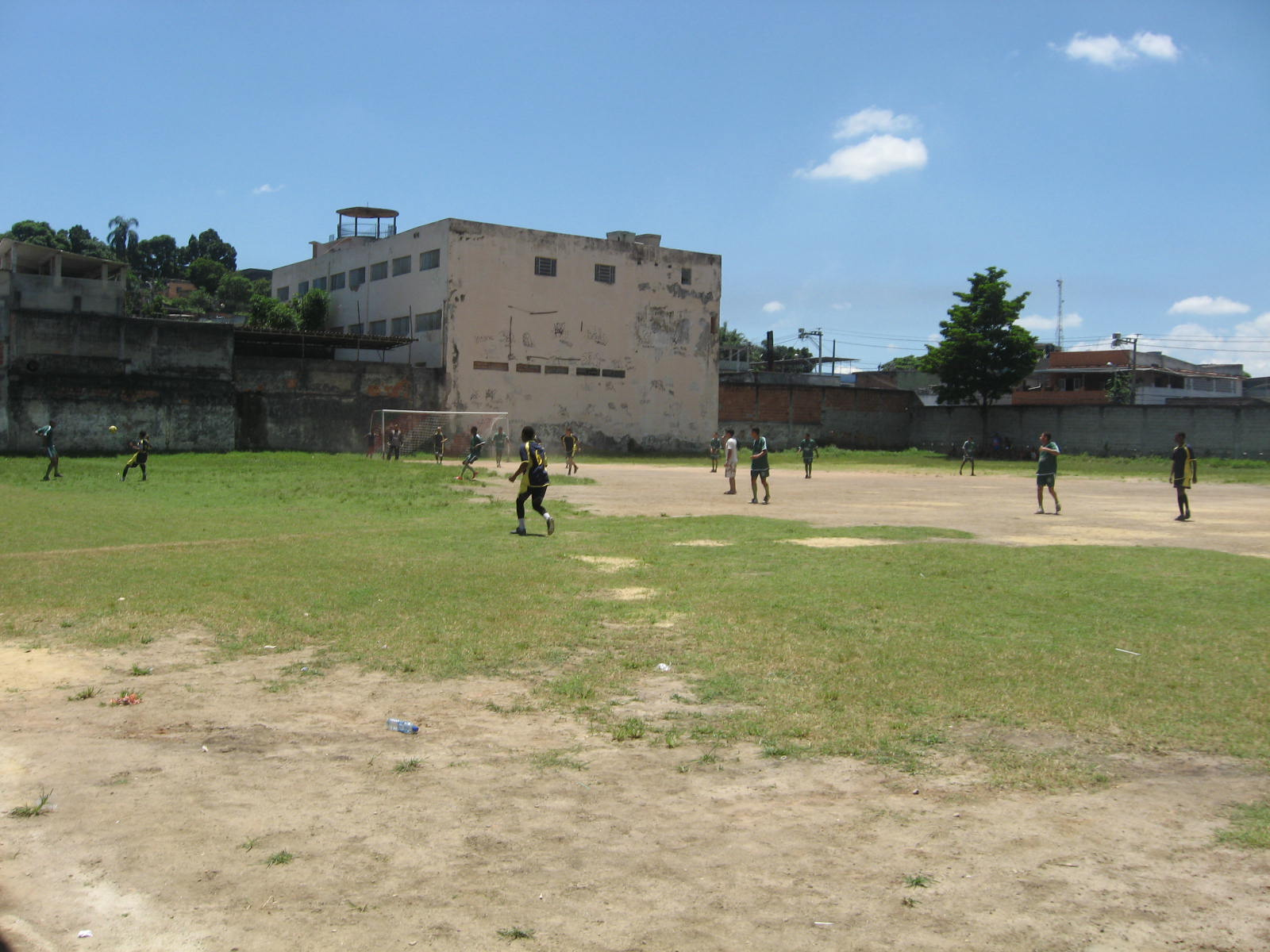 Estádio do Coqueiros Futebol Clube, localizado no bairro Vila Tiradentes, em São João de Meriti.